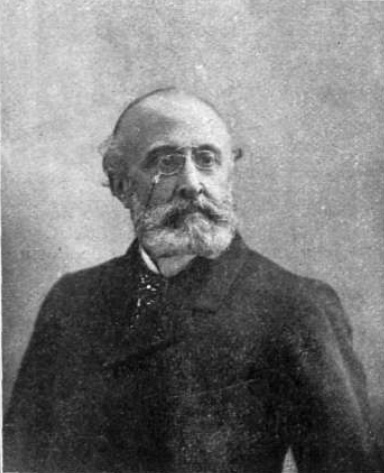 Retrato de Francisco Silvela